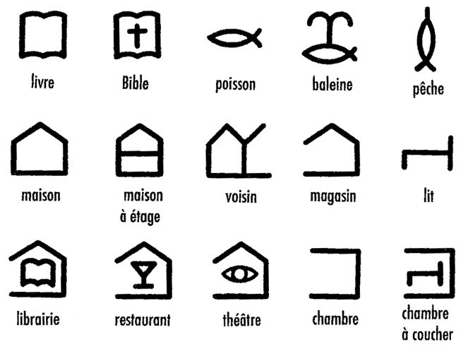 Les 18 signes du langage Locos